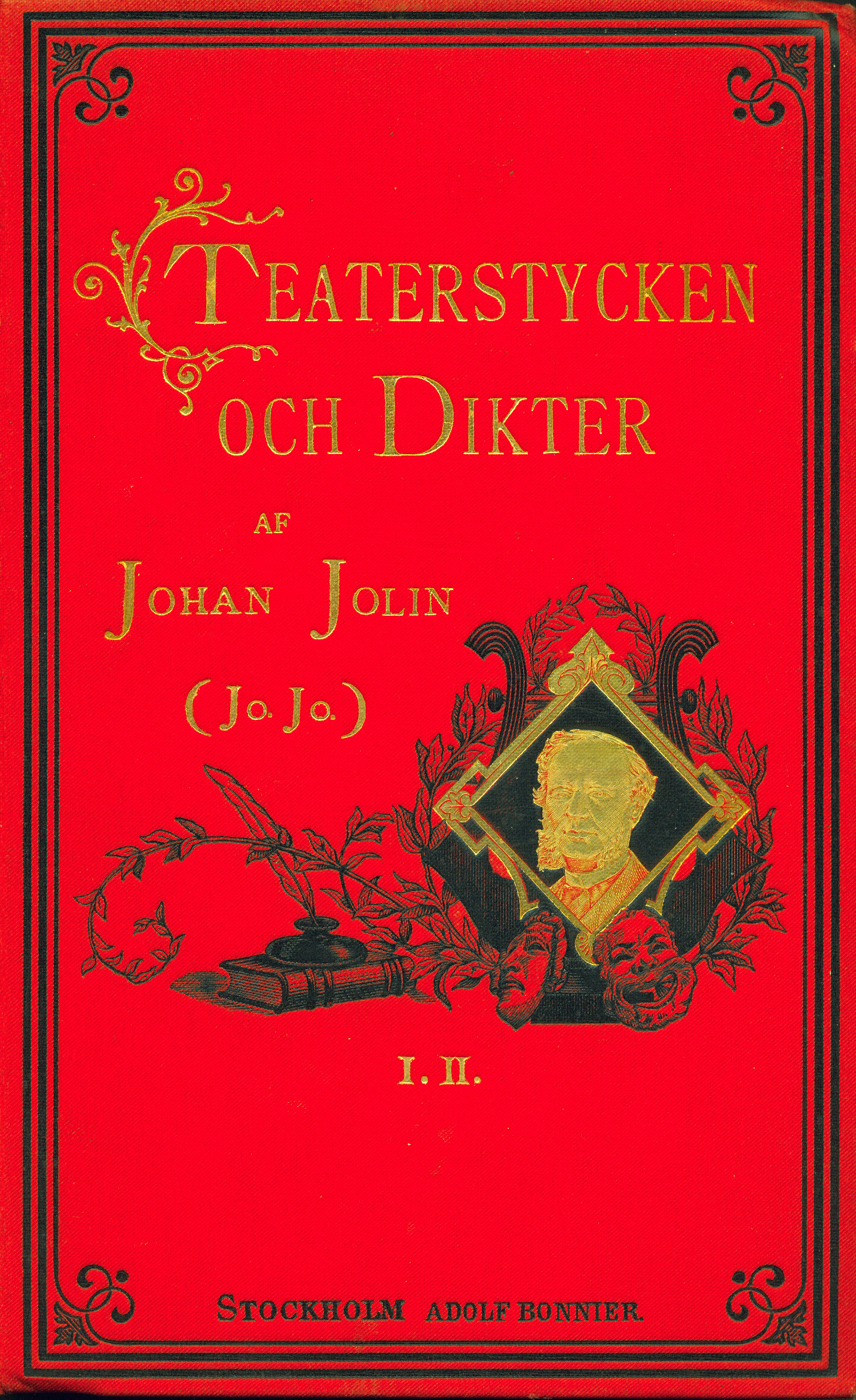 Binding cover: Skrifter af Johan Jolin. Serie III. 1-2. Teaterstycken och dikter